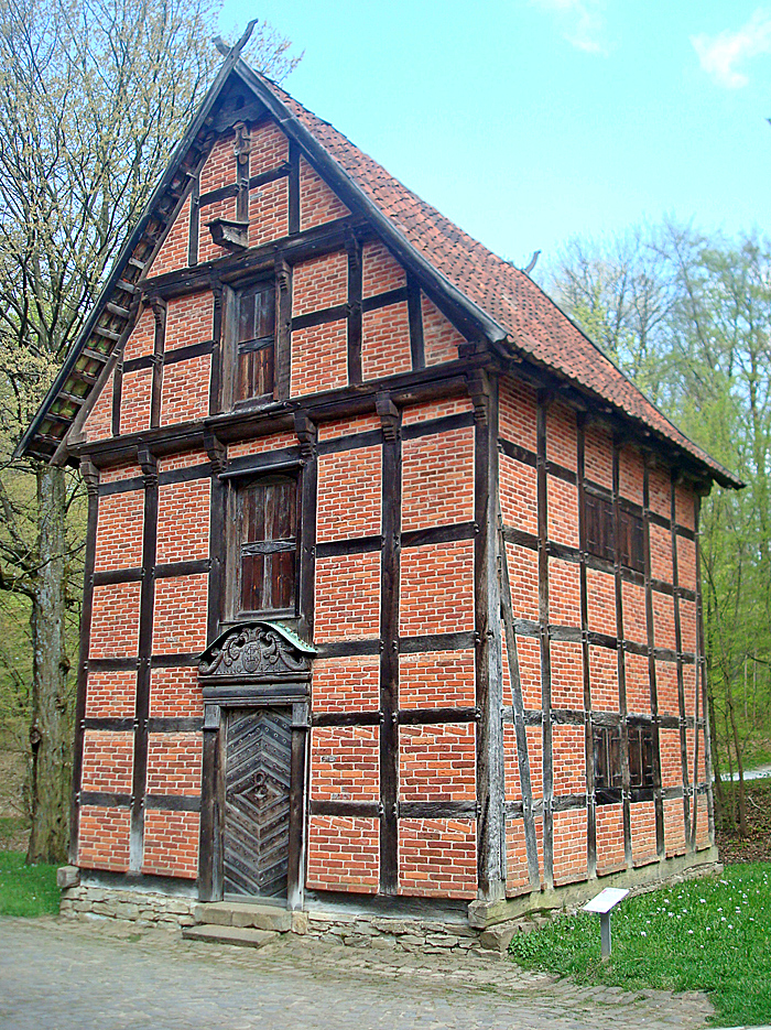 Speicher mit Barockportal, eisernem Türgriff und geschnitzter Portalbekrönung im LWL-Freilichtmuseum Detmold, ursprünglicher Standort Harsewinkel, Bauerschaft Beller, erbaut 1711, dargestellter Zustand frühes 19. Jahrhundert